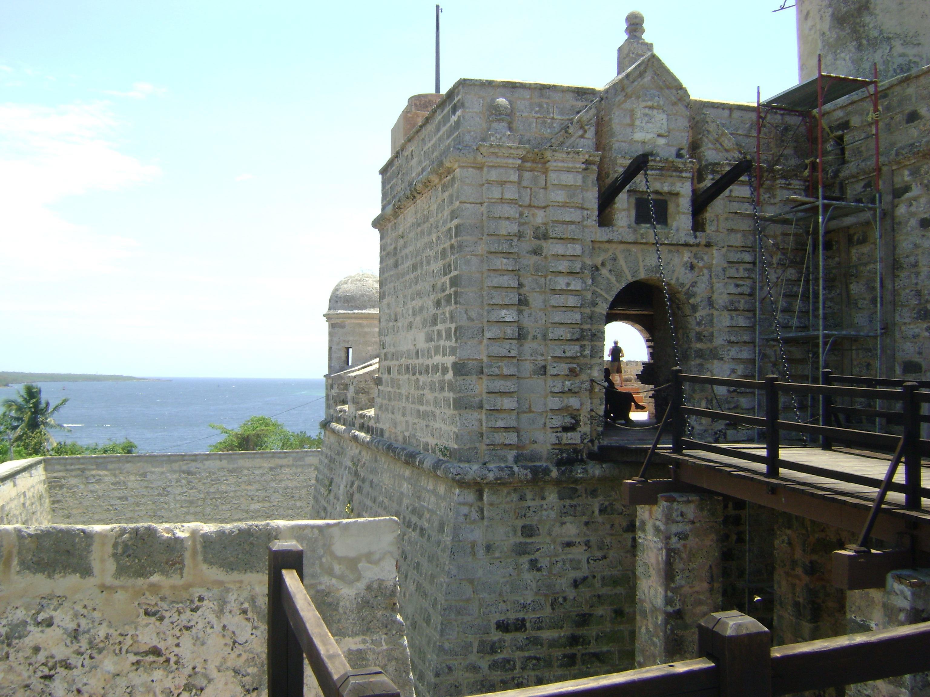 El Castillo de Jagua fue erigido por el rey Felipe V de España (1683-1746) en la década de 1740, (terminado exactamente en 1742) para proteger la bahía de Cienfuegos.